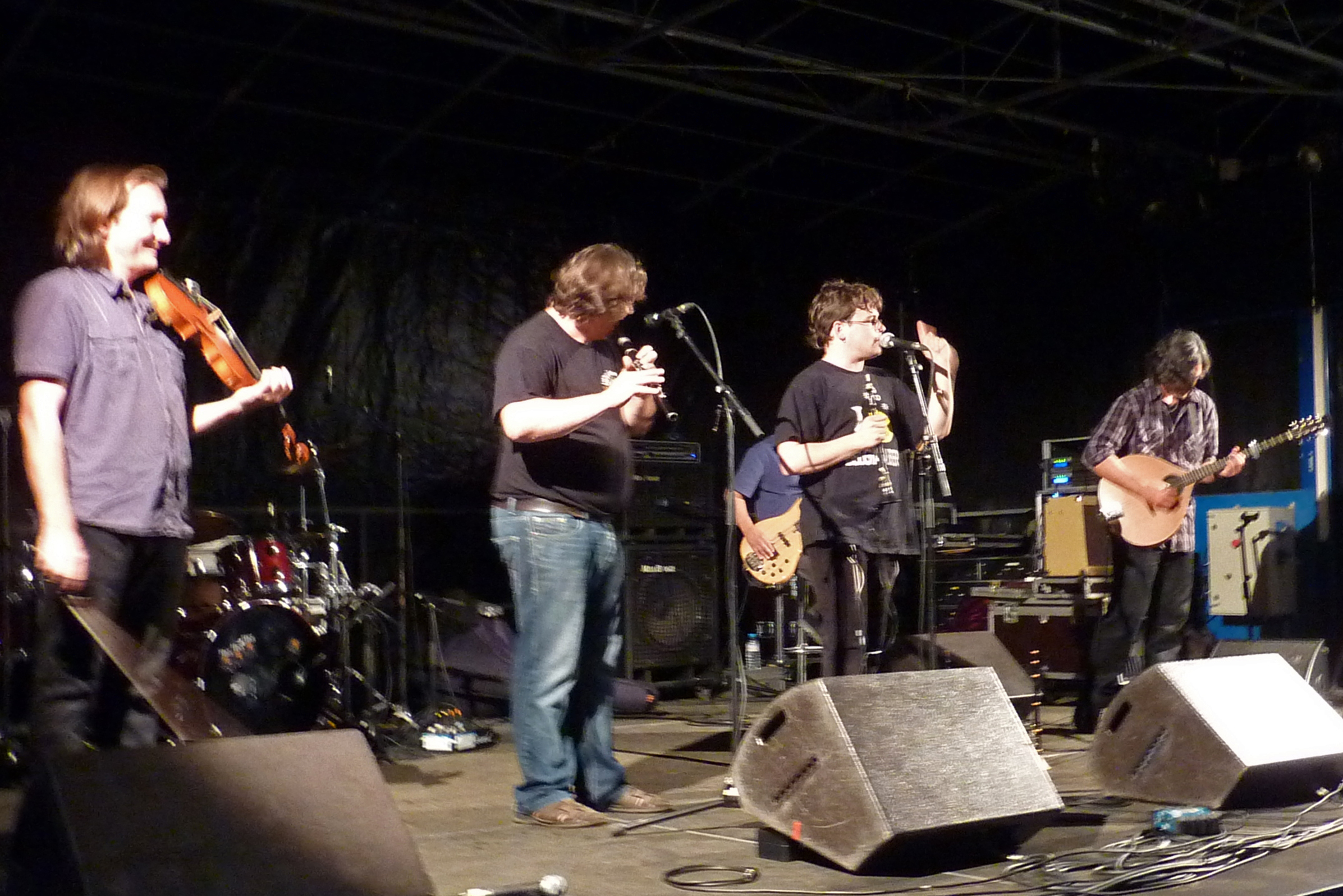 TiTom, fest-noz à St Quay Portieux le 16 août 2013.